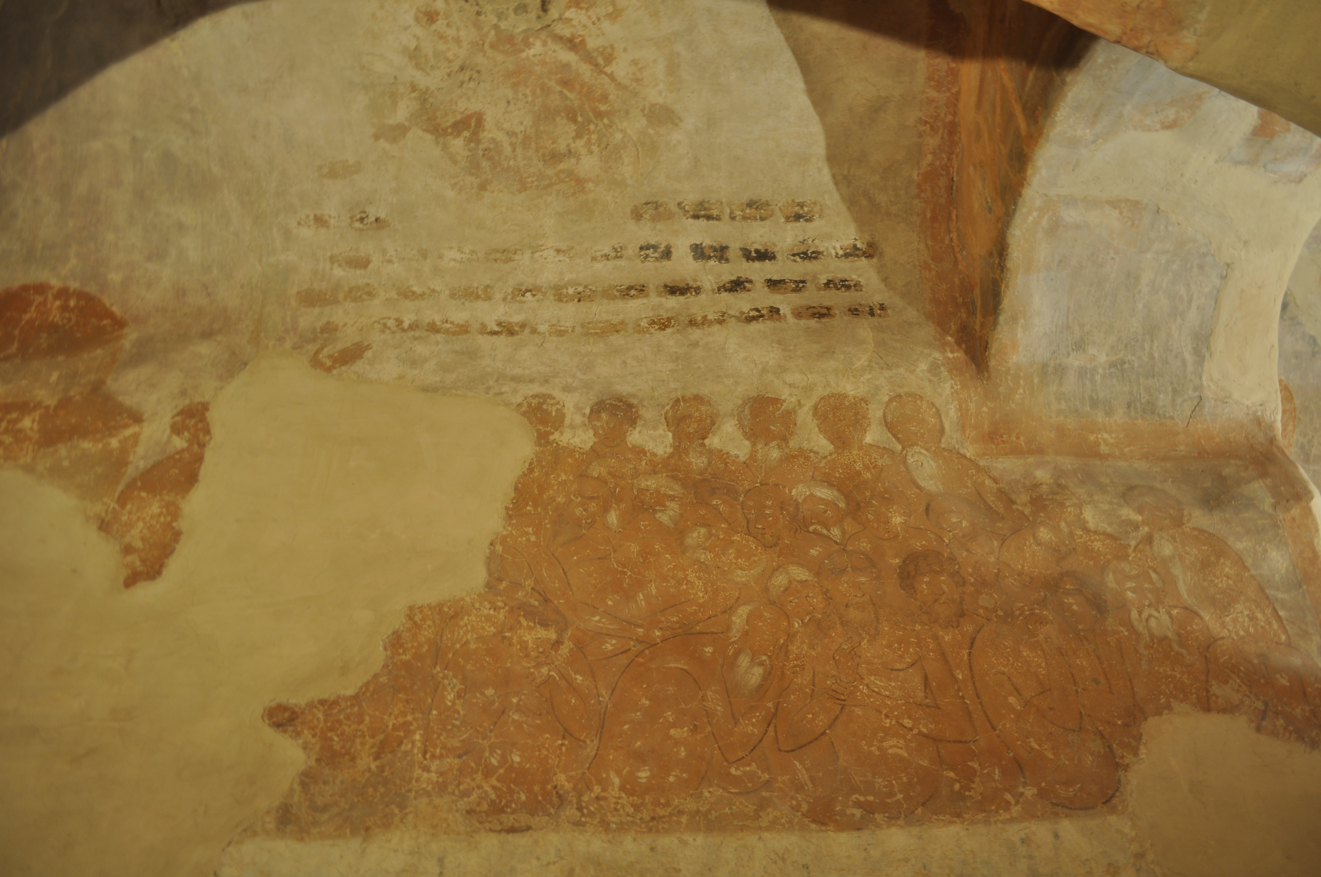 Церковь Фёдора Стратилата на Ручье (Новгородская область, Великий Новгород, улица Федоровский Ручей, 19)